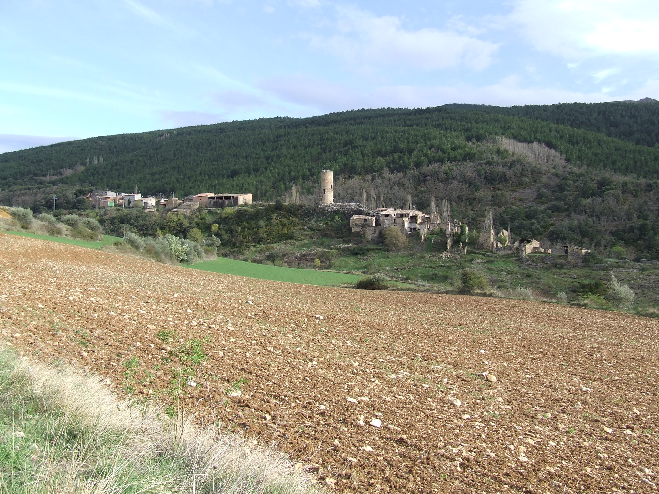 Vista general del poble d'Alsamora (Sant Esteve de la Sarga, Pallars Jussà)